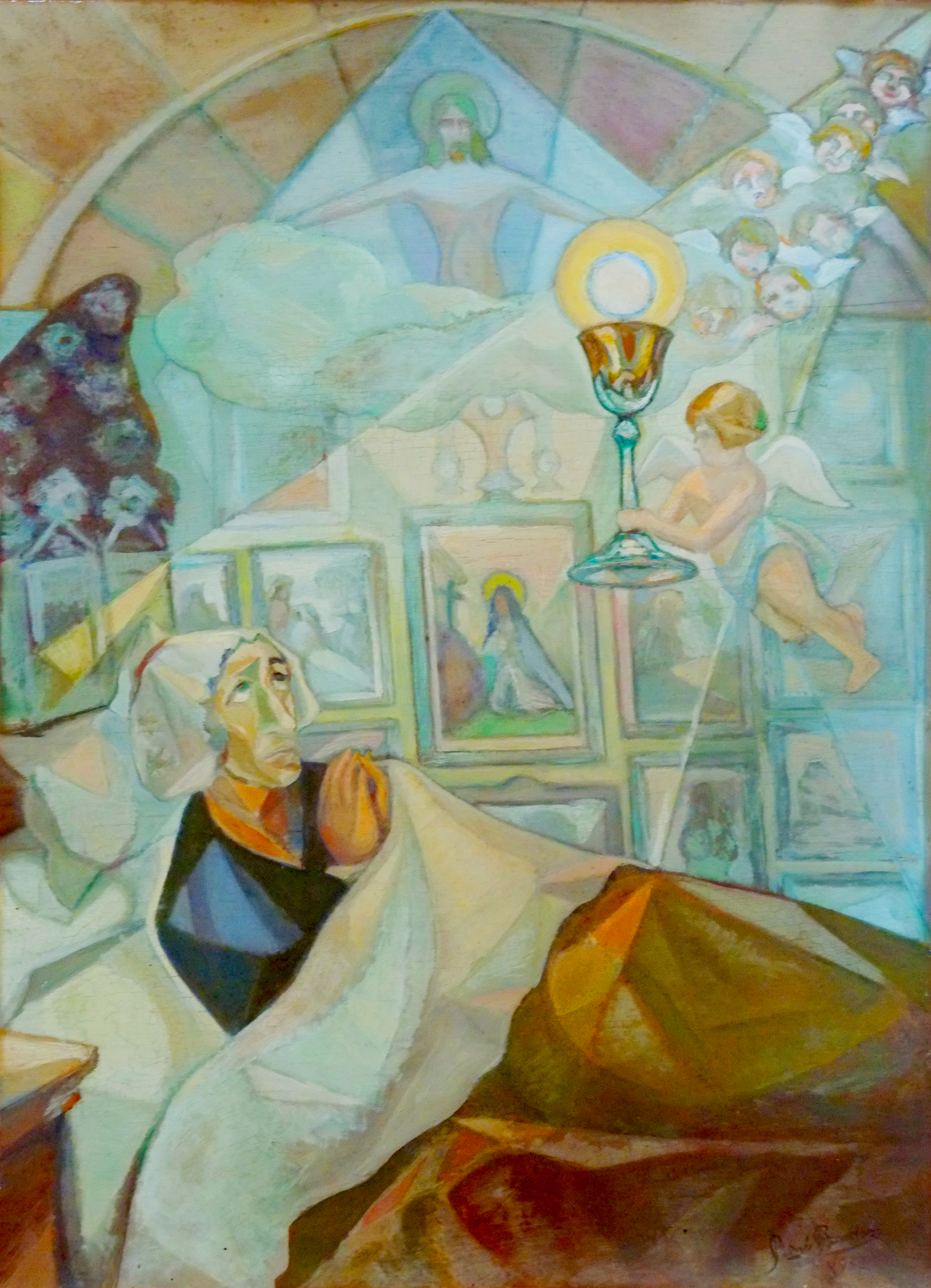 Serva de Deus